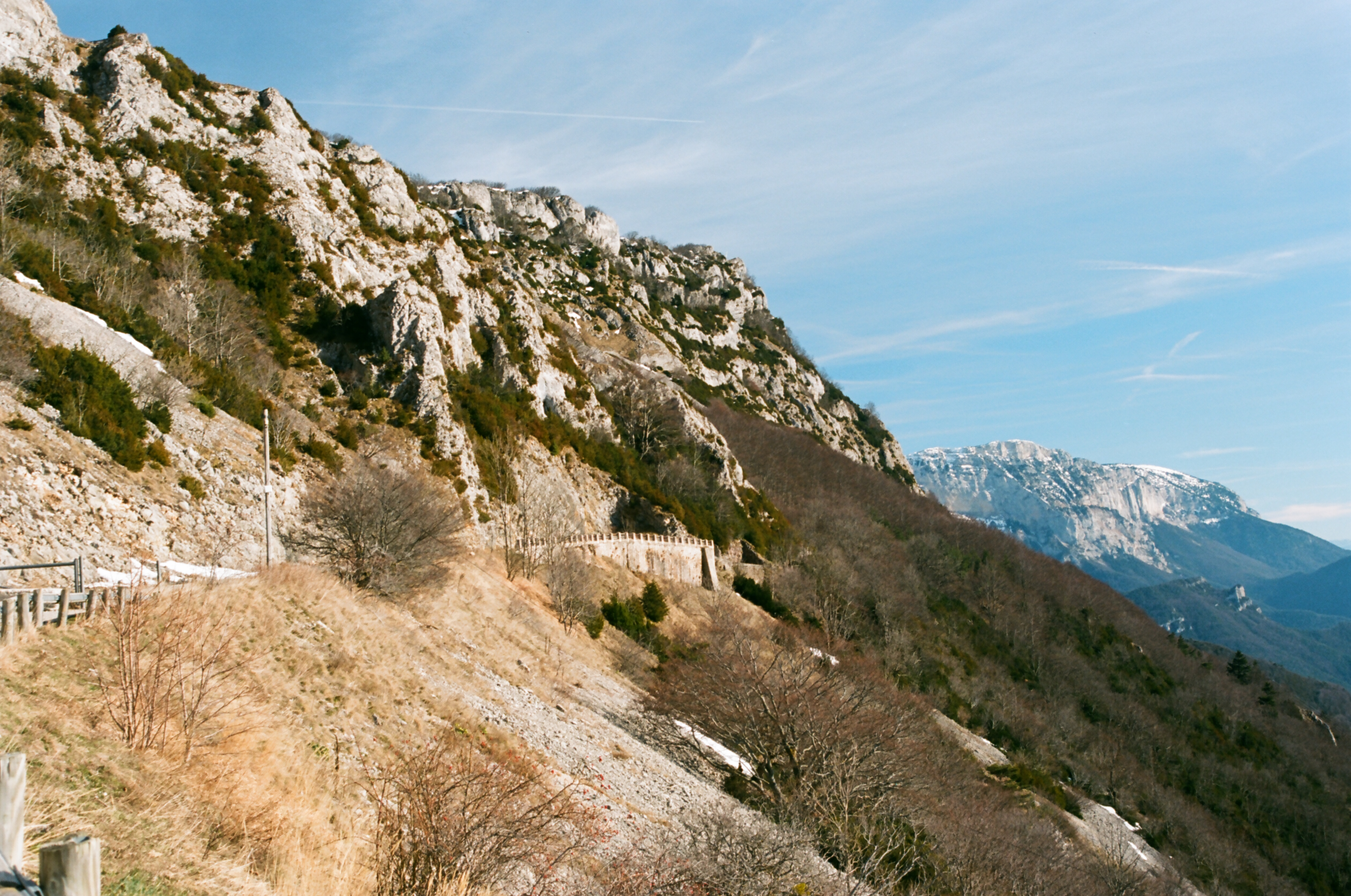 Col de Rousset (sud)